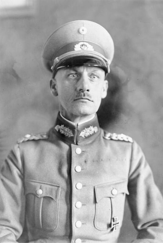 Wilhelm Ritter von Leeb Generalleutnant Ritter Wilhelm von Leeb wird mit 1. Februar [1930] zum neuen Landeskommandanten von Bayern als Nachfolger von Ruith ernannt. [Porträt Ritter Wilhelm von Leeb] Abgebildete Personen: Leeb, Wilhelm von Ritter: Generalfeldmarschall, Ritterkreuz (RK), Heer, 1942 entlassen, Deutschland (GND 118570870)